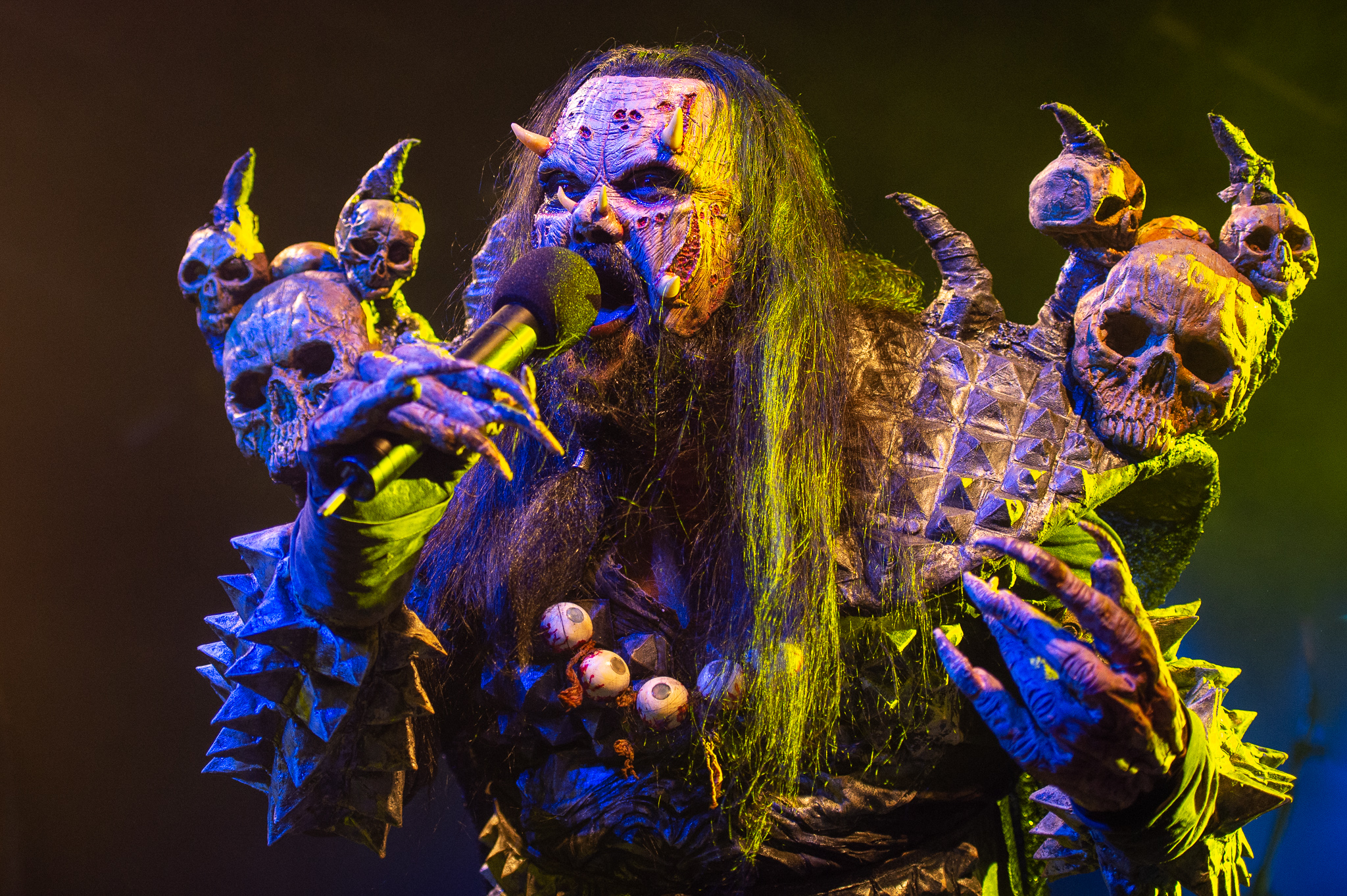 Concertbüro Franken,Der Hirsch,Konzert,Livekonzert,Livemusik,Lordi,Mr. Lordi,Musik,Tomi Petteri Putaansuu